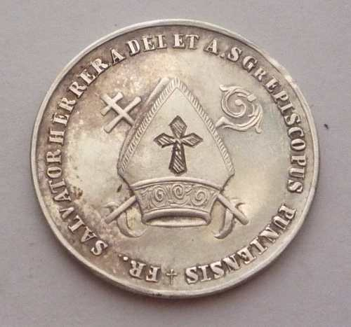 Medal of Mons. Herrera